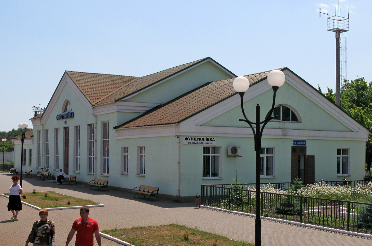 Вокзал ст. Фундукліївка